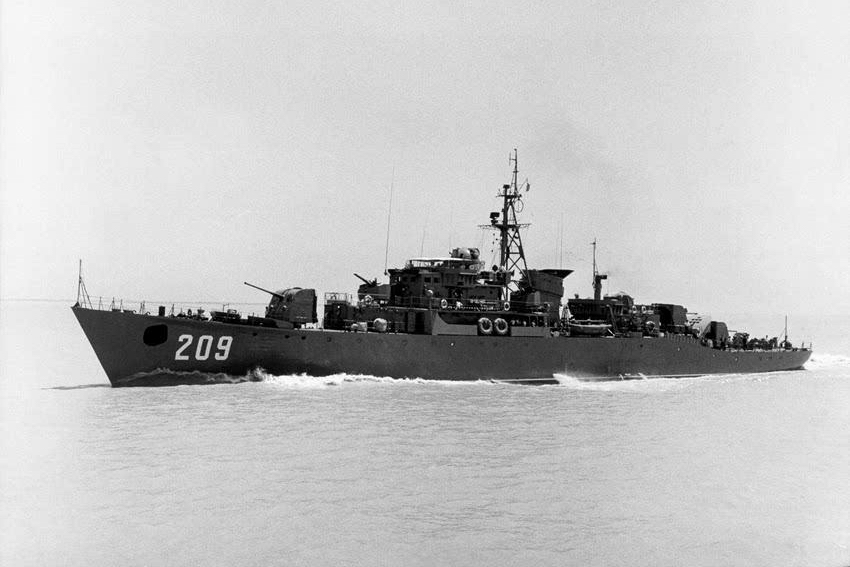 65型海口号护卫舰 (舷号209, 后改为529)